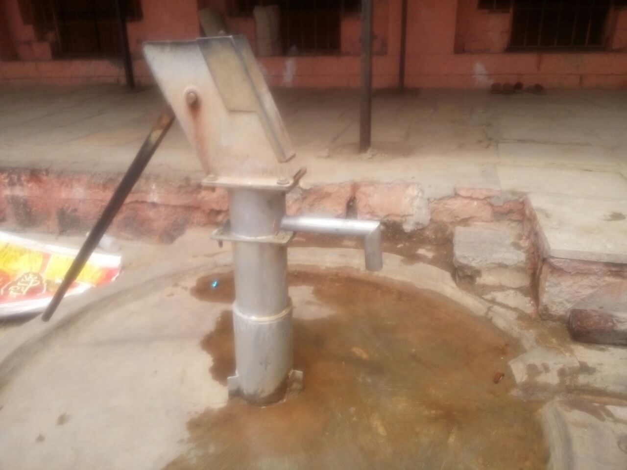 हापसा